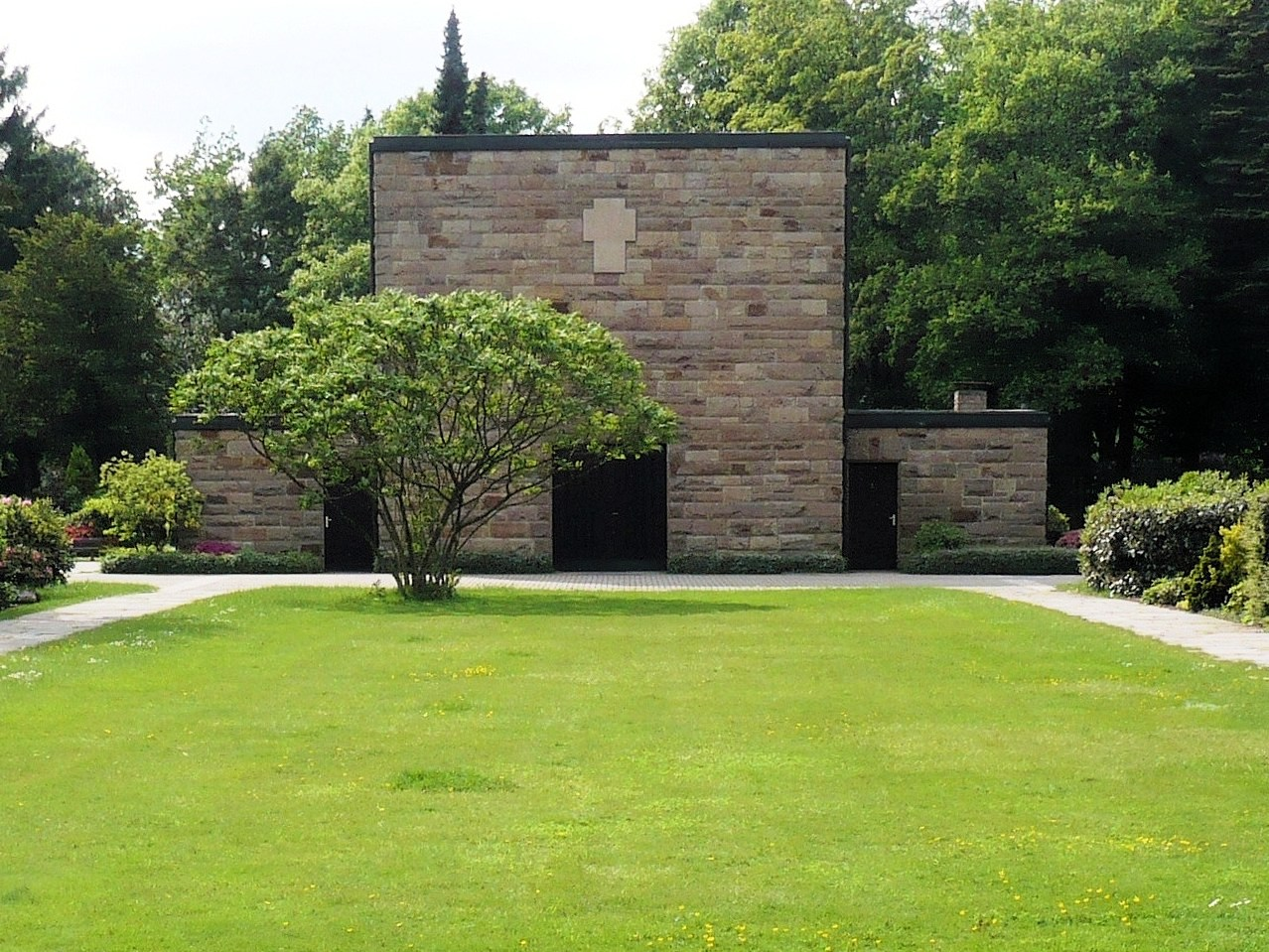 Friedhof Bredeney in Essen, Kapelle von 1952